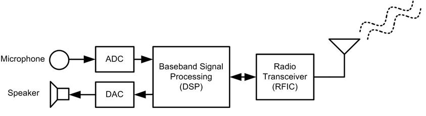 Ejemplo de aplicación de un RFIC: telefonía móvil